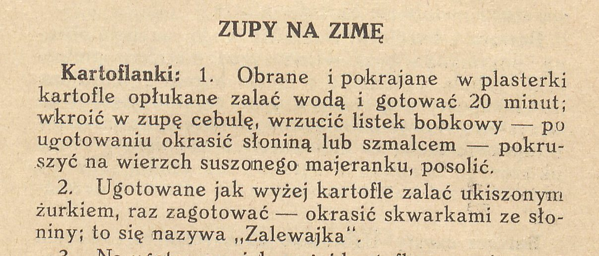 Zalewajka - przepis, książka "Przepisy dawne i nowe", 1933. Domena publiczna.